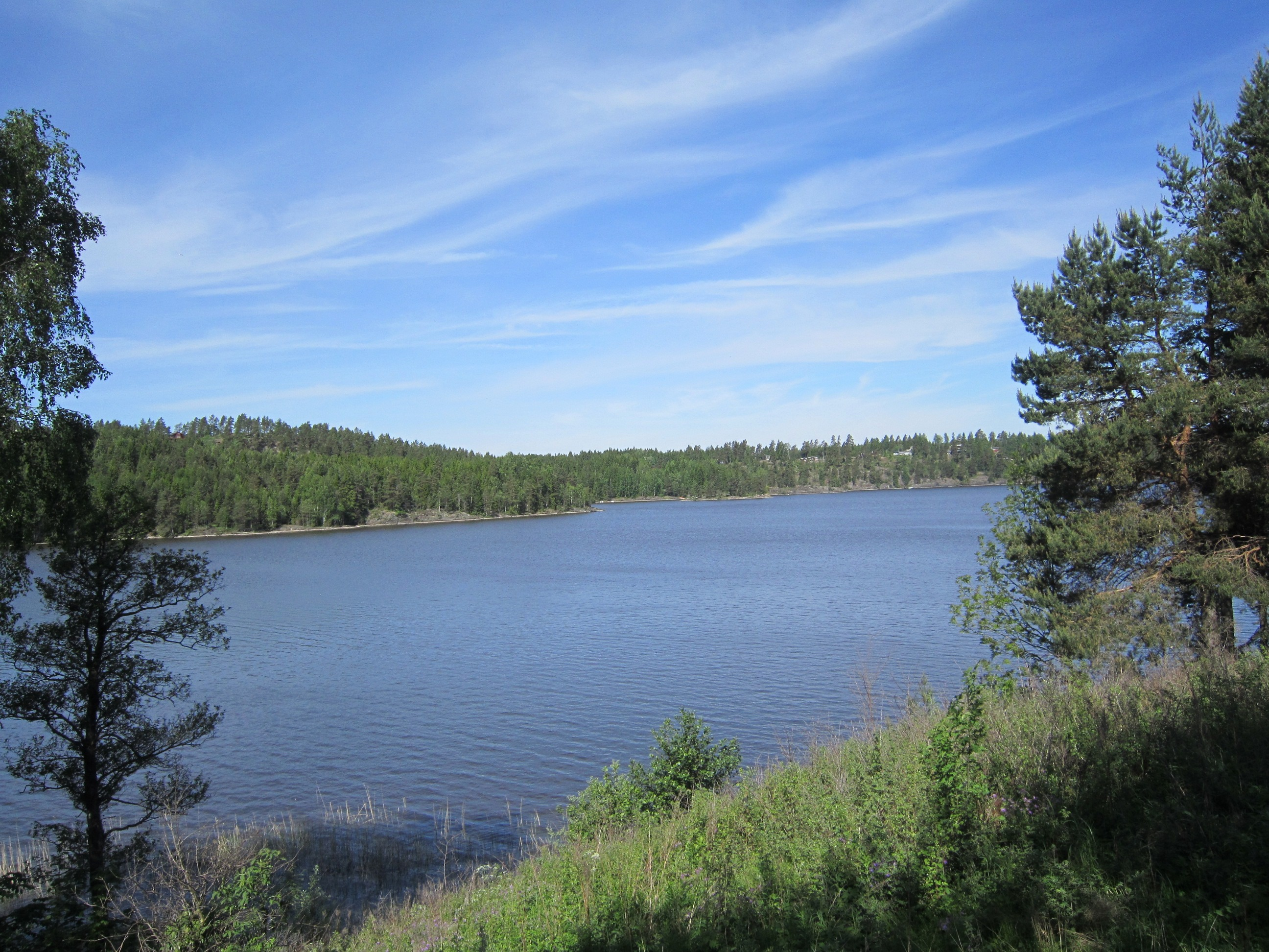 Aremarksjøen (eller Ara) ved Aremark kirke